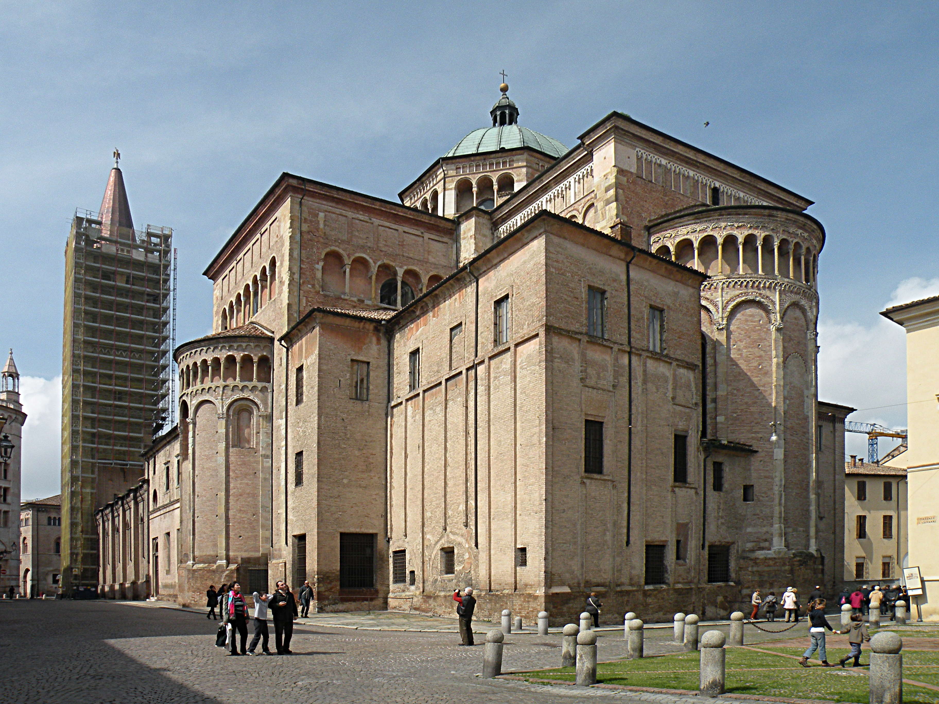 Собор города Пармы (вид со стороны апсиды -apsis)